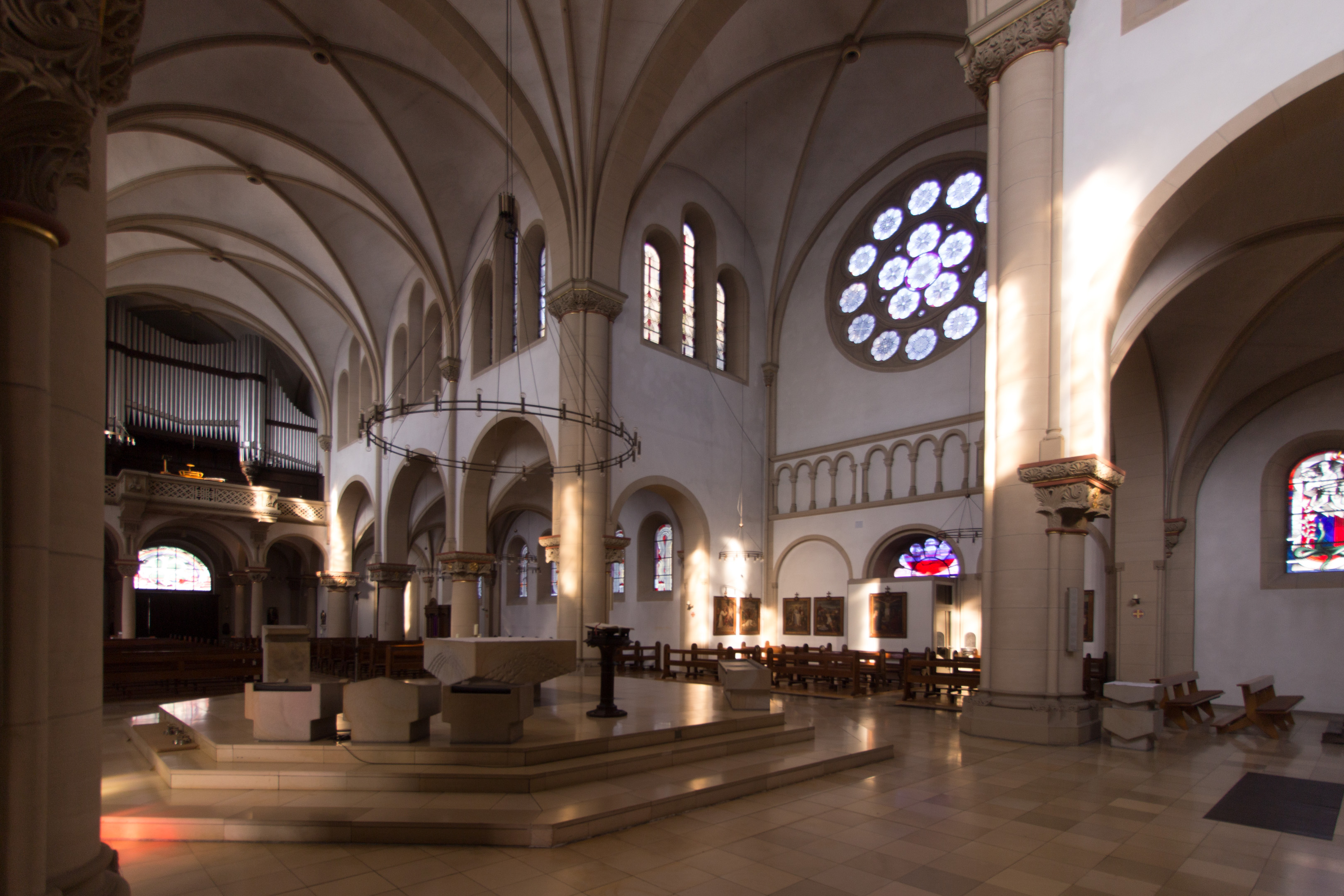 Recklinghausen, Pauluskirche, VierungThis is a photograph of an architectural monument., no. 42